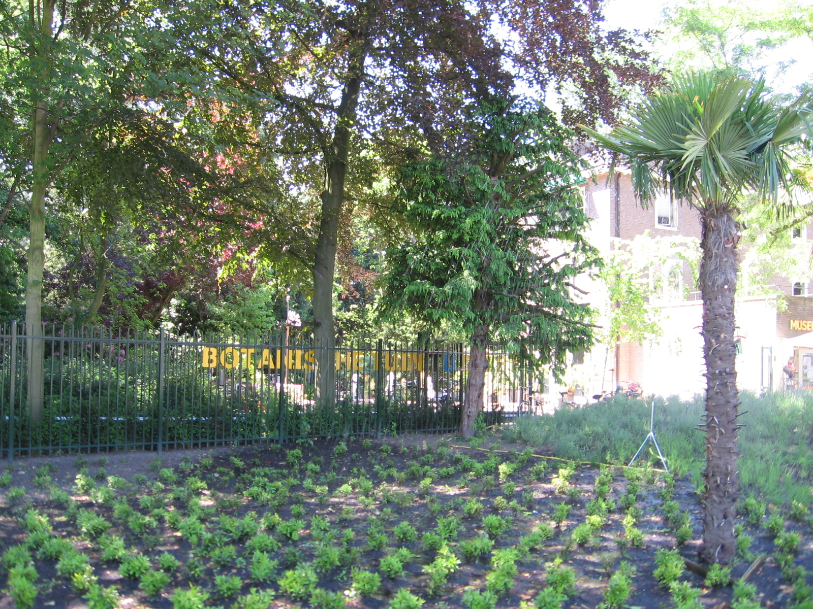 Entry Botanische Tuin TU Delft, 11 juni